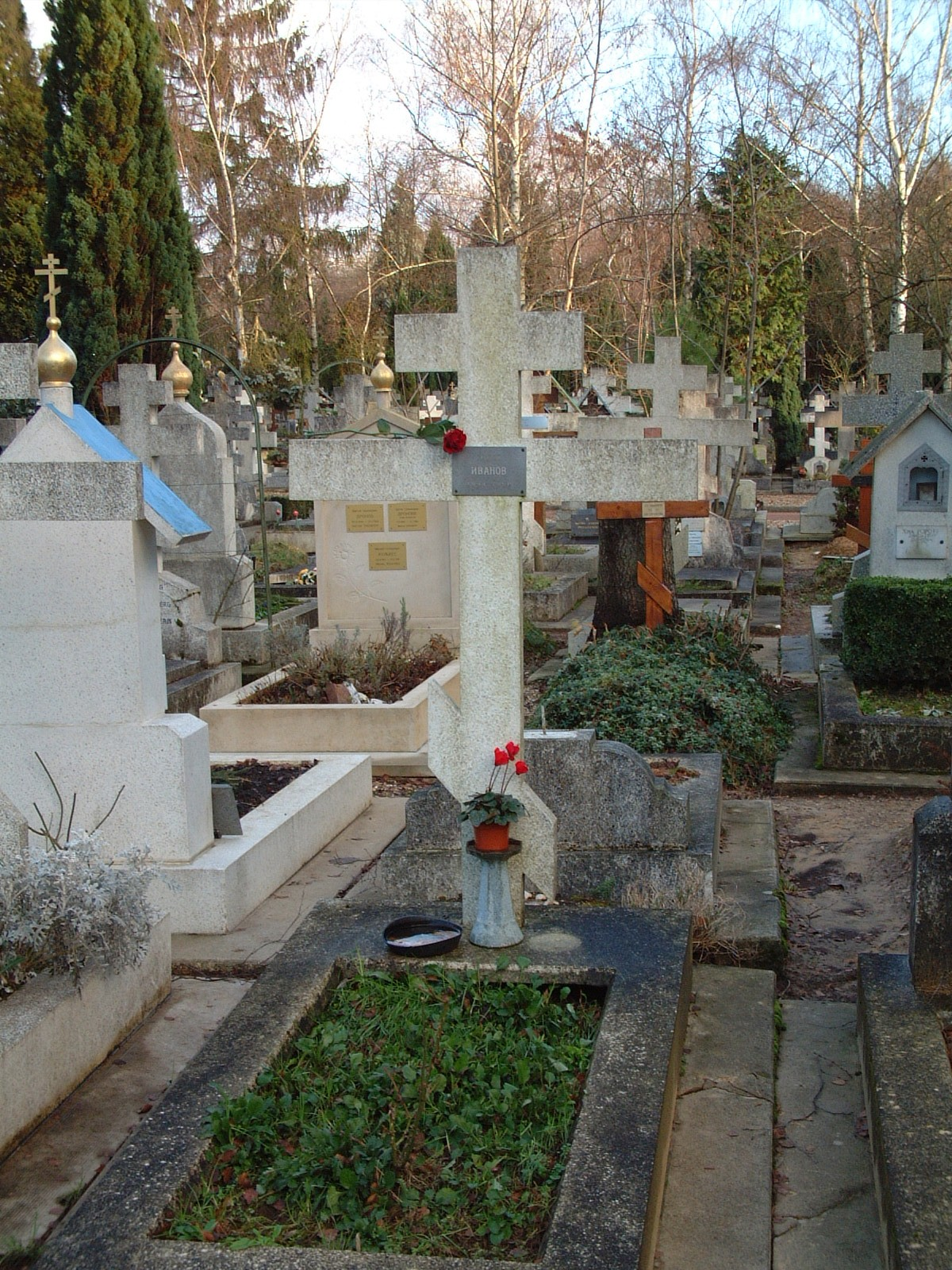 Georgij Iwanow Grab auf dem Russischen Friedhof von Sainte-Geneviève-des-Bois Russian Cemetery